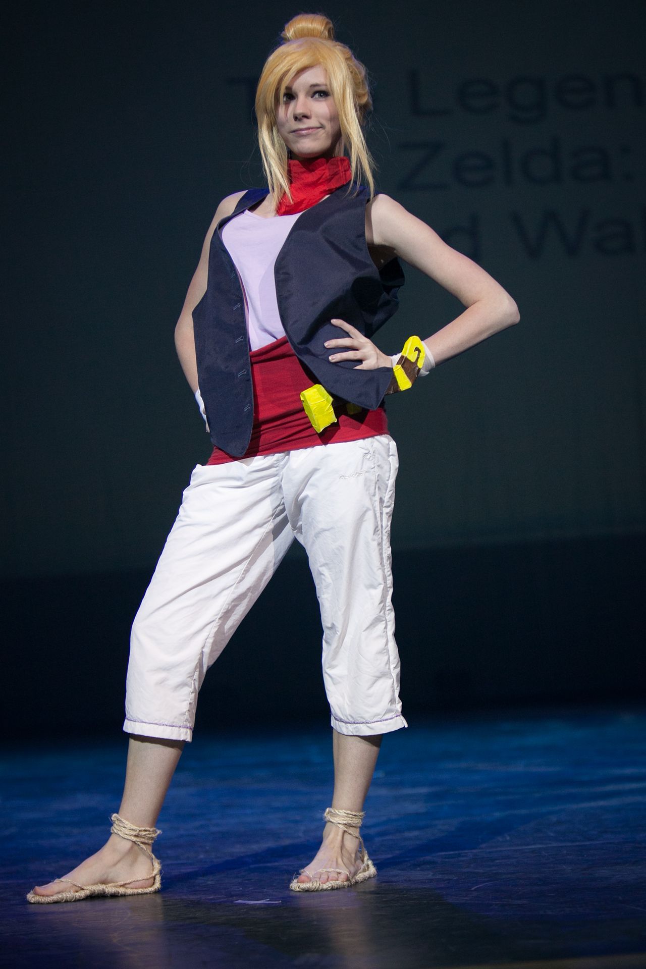 20140118171053IMG_5291